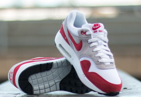 Nike Air Max '87 známe ako Nike Air Max 1